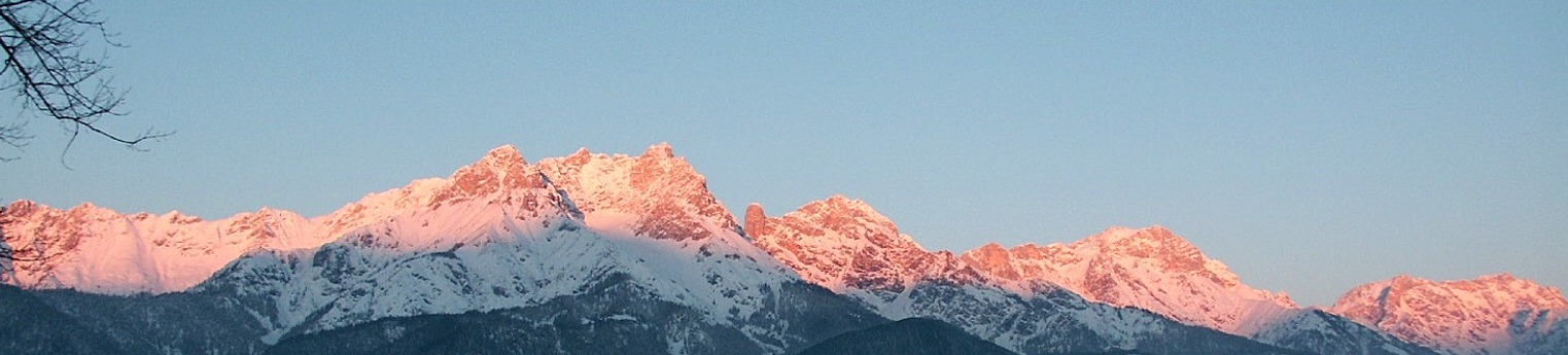 Steinernes Meer bei Saalfelden: Von links nach rechts: Schindlköpfe (2357 m), Persailhorn (2347 m), Mitterhorn (2491 m), Breithorn (2504 m), Sommerstein (2308 m) an der Ramseider Scharte (Riemannhaus), Schönegg (2390 m) und Schönfeldspitze (2653 m), sowie Selbhorn (2.655 m)